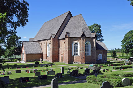 Tensta Church, Sweden